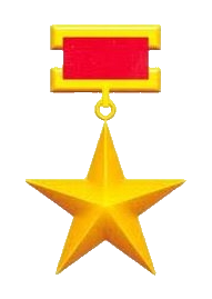 Orden de la Estrella de Oro (1947-2003).